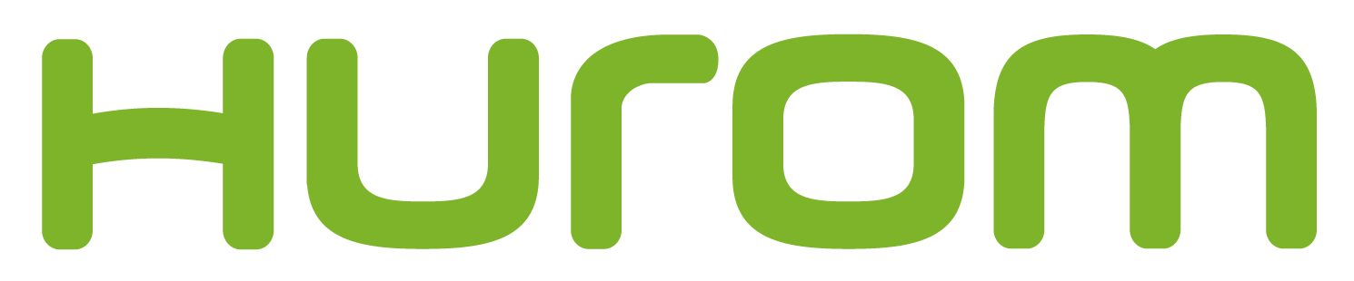 원액기 회사 휴롬의 로고